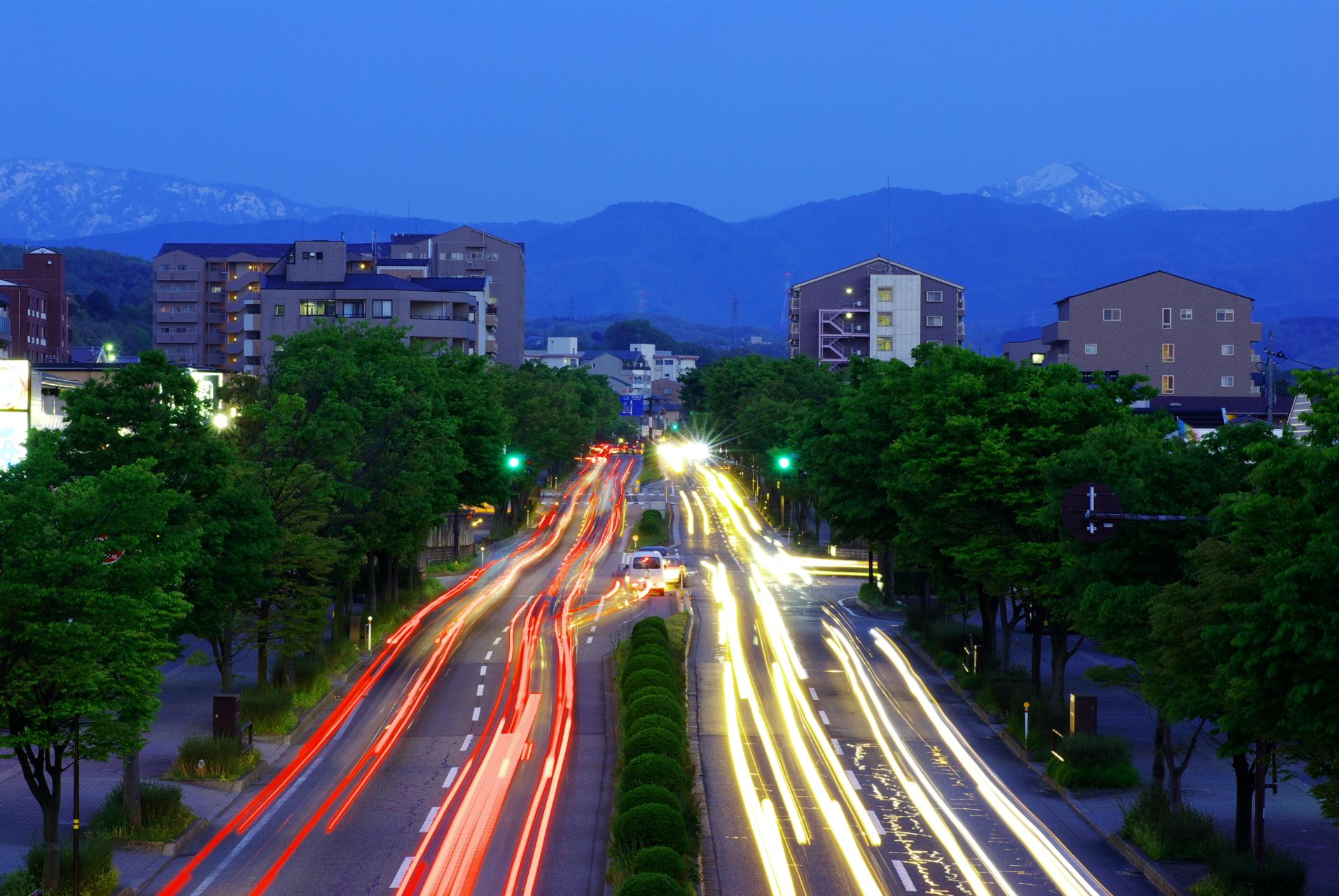 金沢市外環状道杜の里付近と大門山